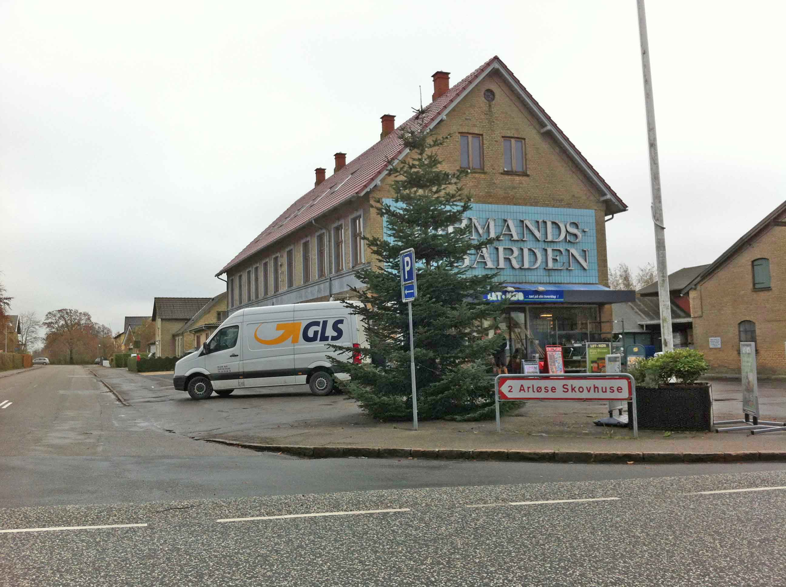 Købmandsgården i Sandved